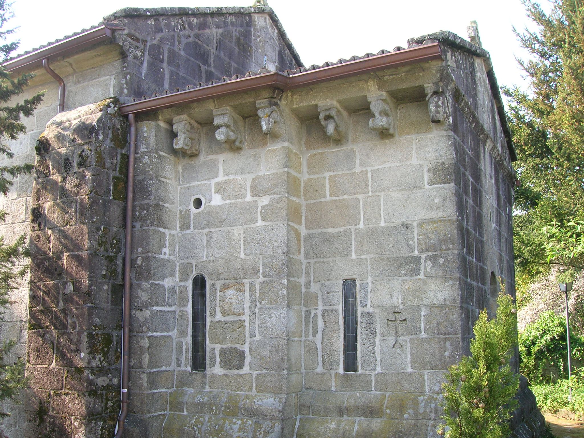 Esta foto participó en el juego En un lugar de Flickr.